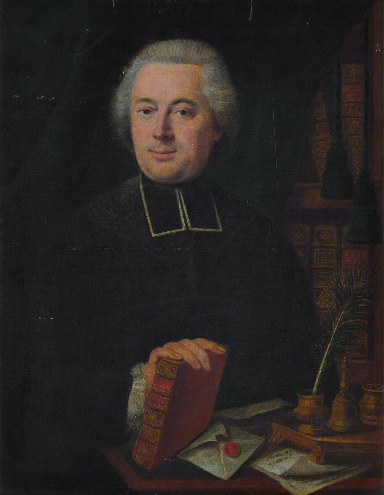 Abbé Claude Carlier (1725-1787)